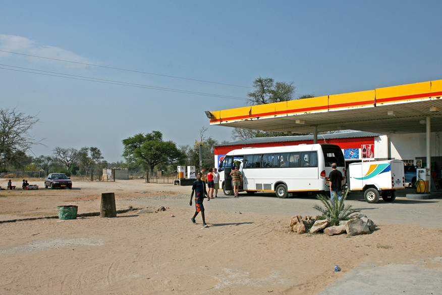 Bagani, petrol station